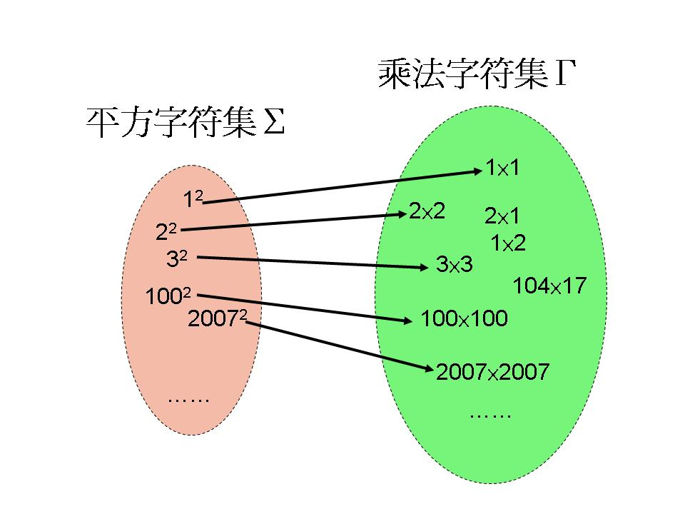 乘法與平方的多一變換示意圖。